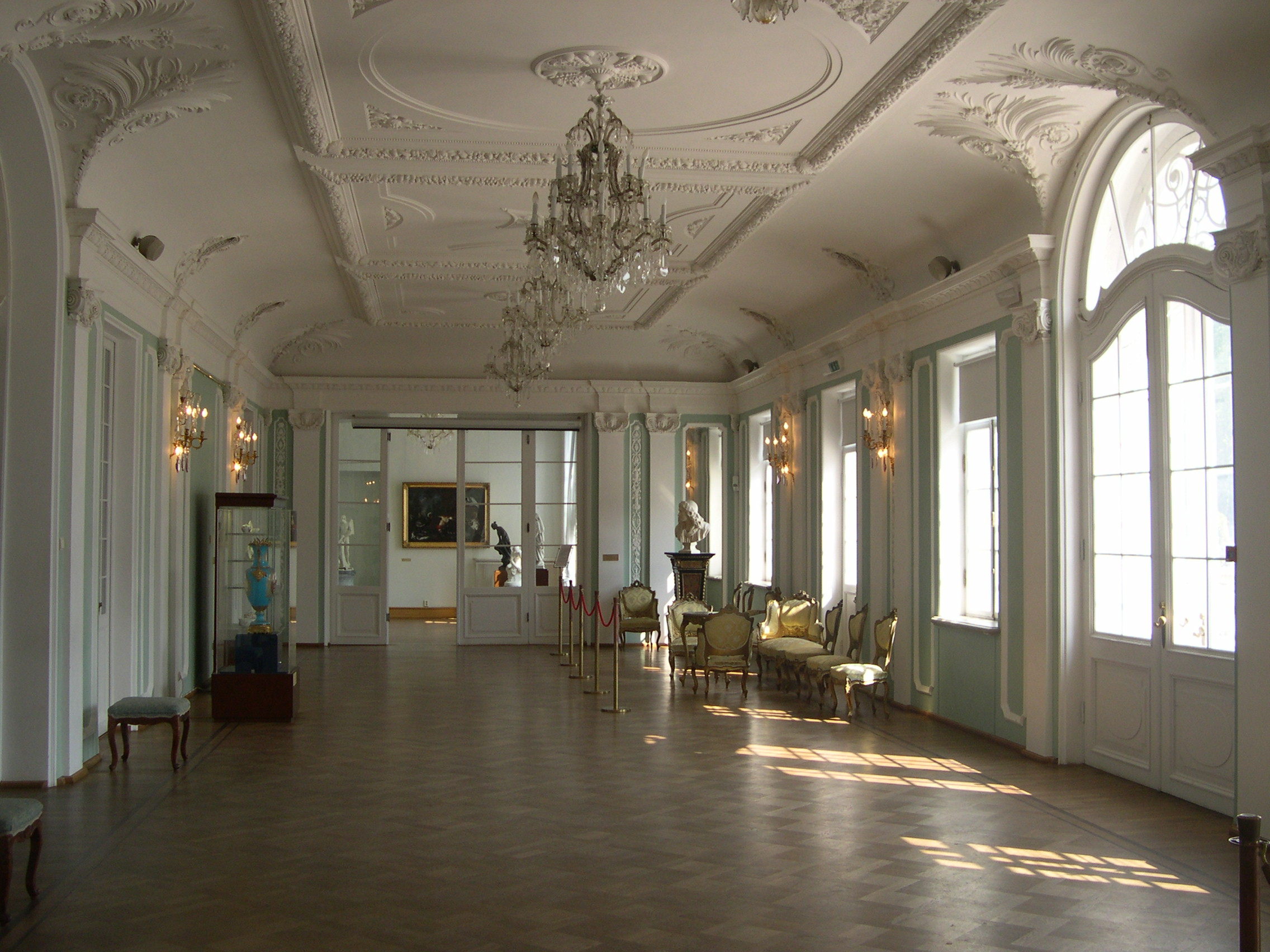 Kadrioru_lossi_sisevaade_2006